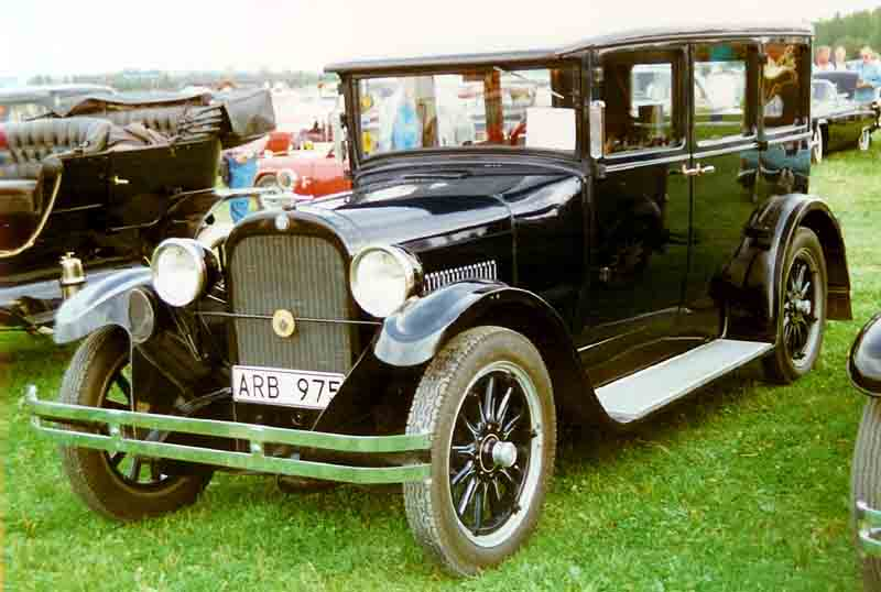 Dodge Series 126/124 4-Door Sedan 1927